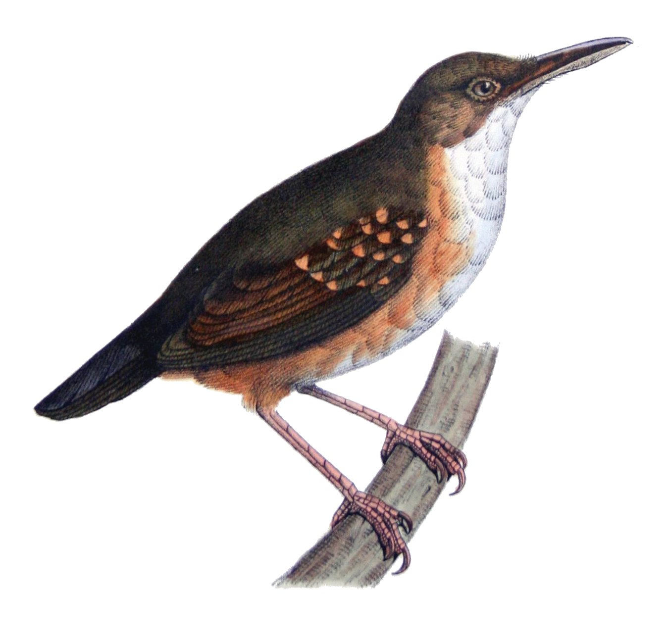 Herpsilochmus argentatus O. Des M. et de Cast. = Sclateria naevia argentata (Des Murs, 1856)